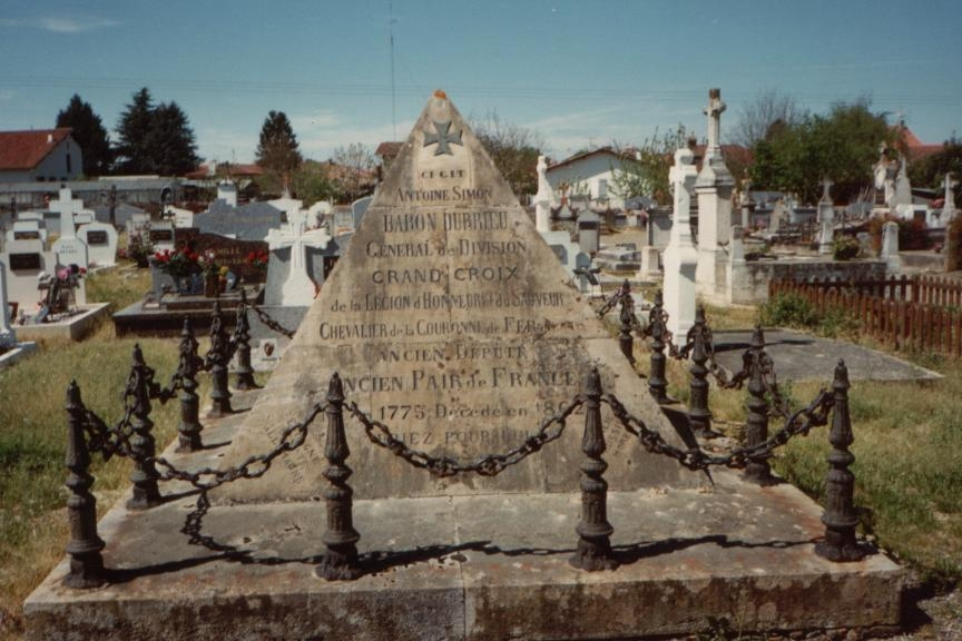 Tombe d'Antoine Simon Durrieu, à Saint-Sever (Landes, France). Photo fournie par Philippe Comte MICHAUX de VILLAREPOS